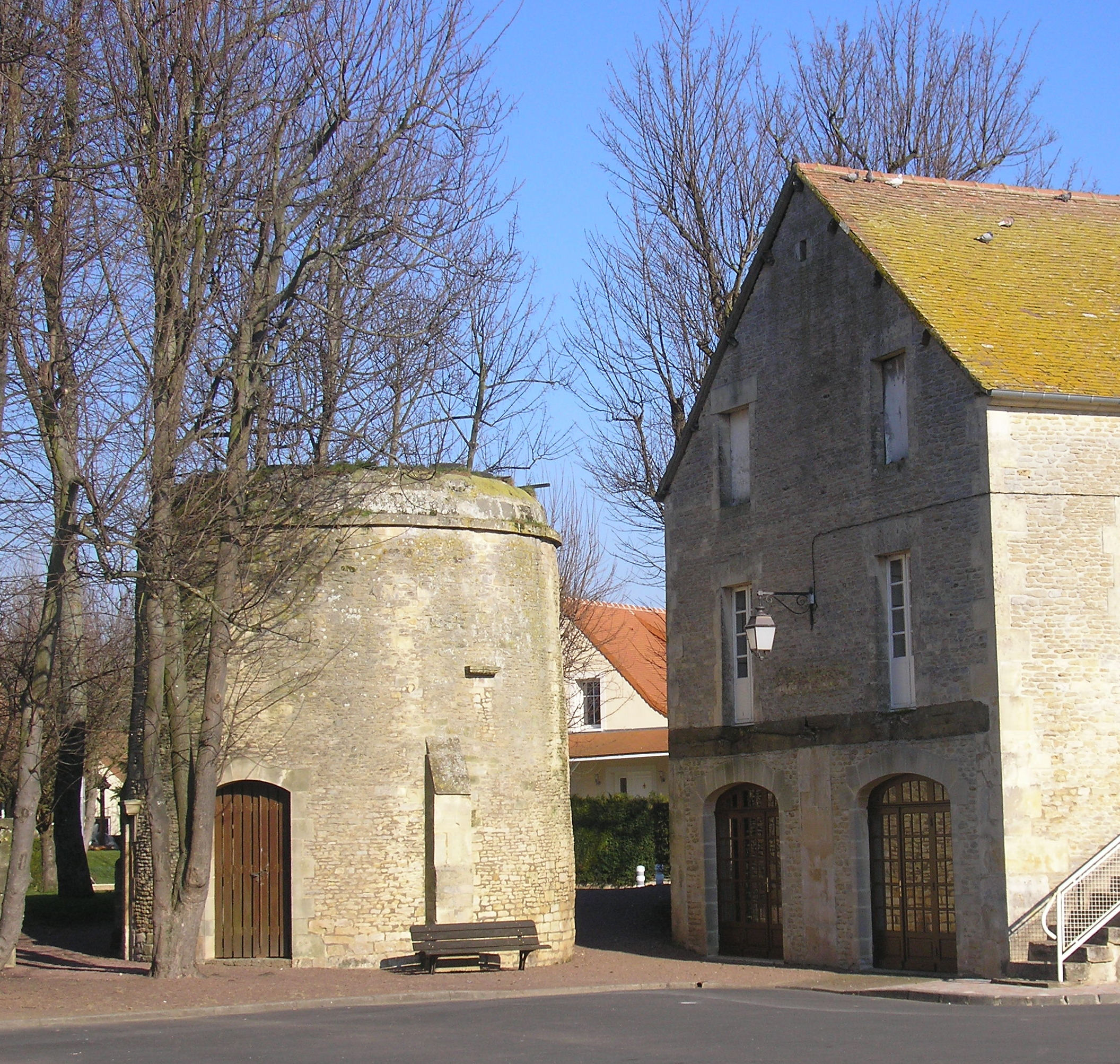 Cambes-en-Plaine (Normandie, France). Le colombier, Place de l'Amitié.